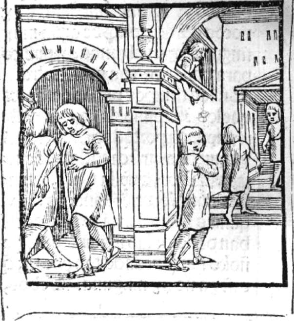 Рисунок из Хроники Перу, 1553